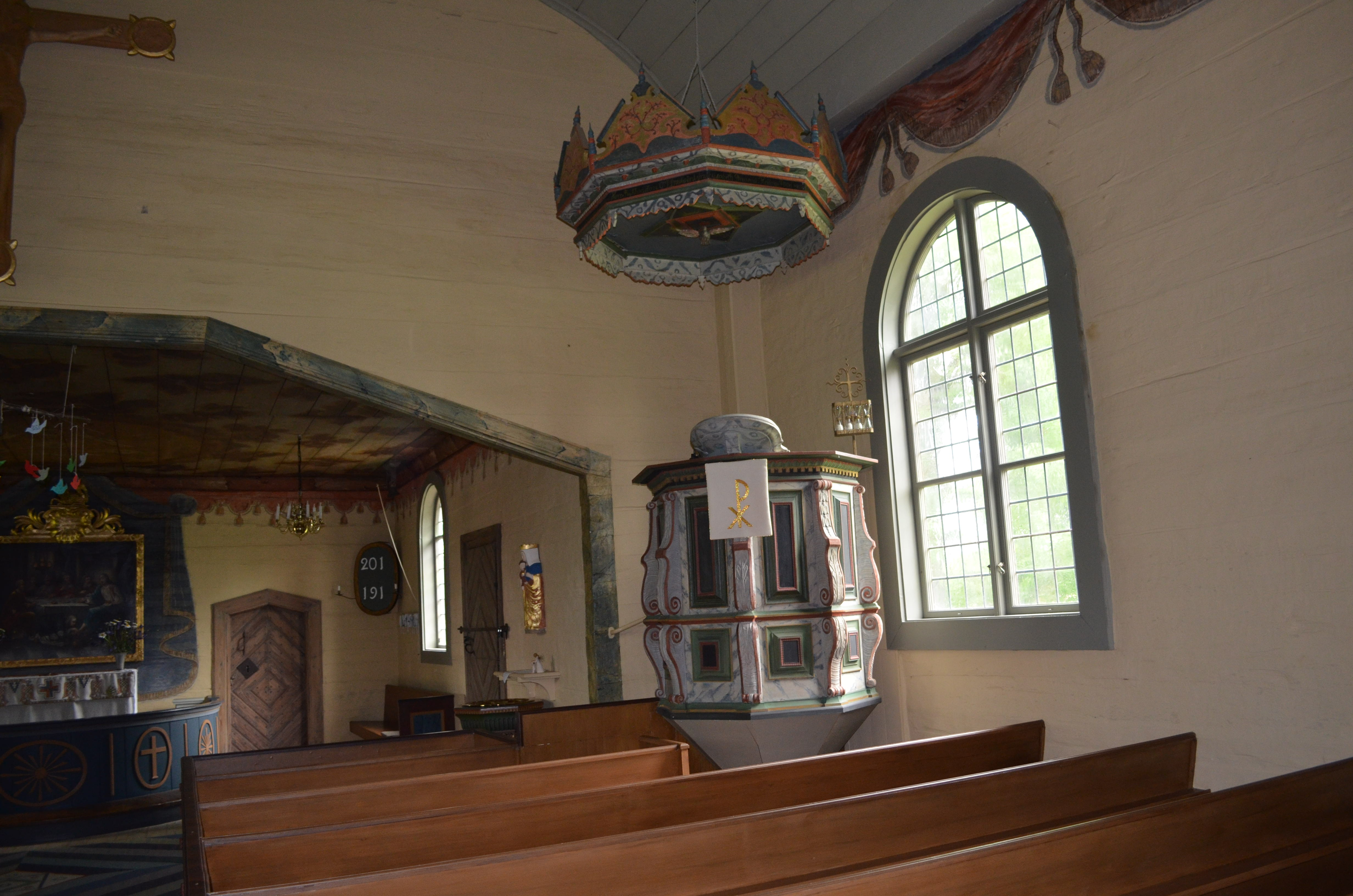 Predikstolen